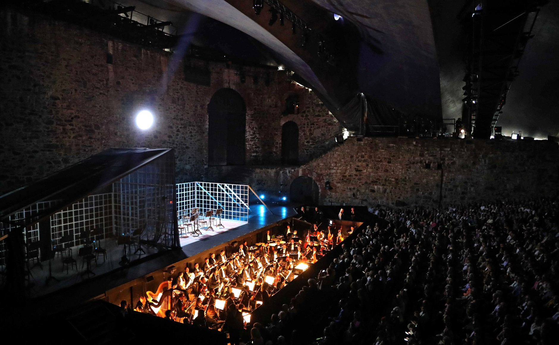 Перед началом оперы «Иоланта» в замке Олавинлинна. Савонлинна, замок Олавинлинна